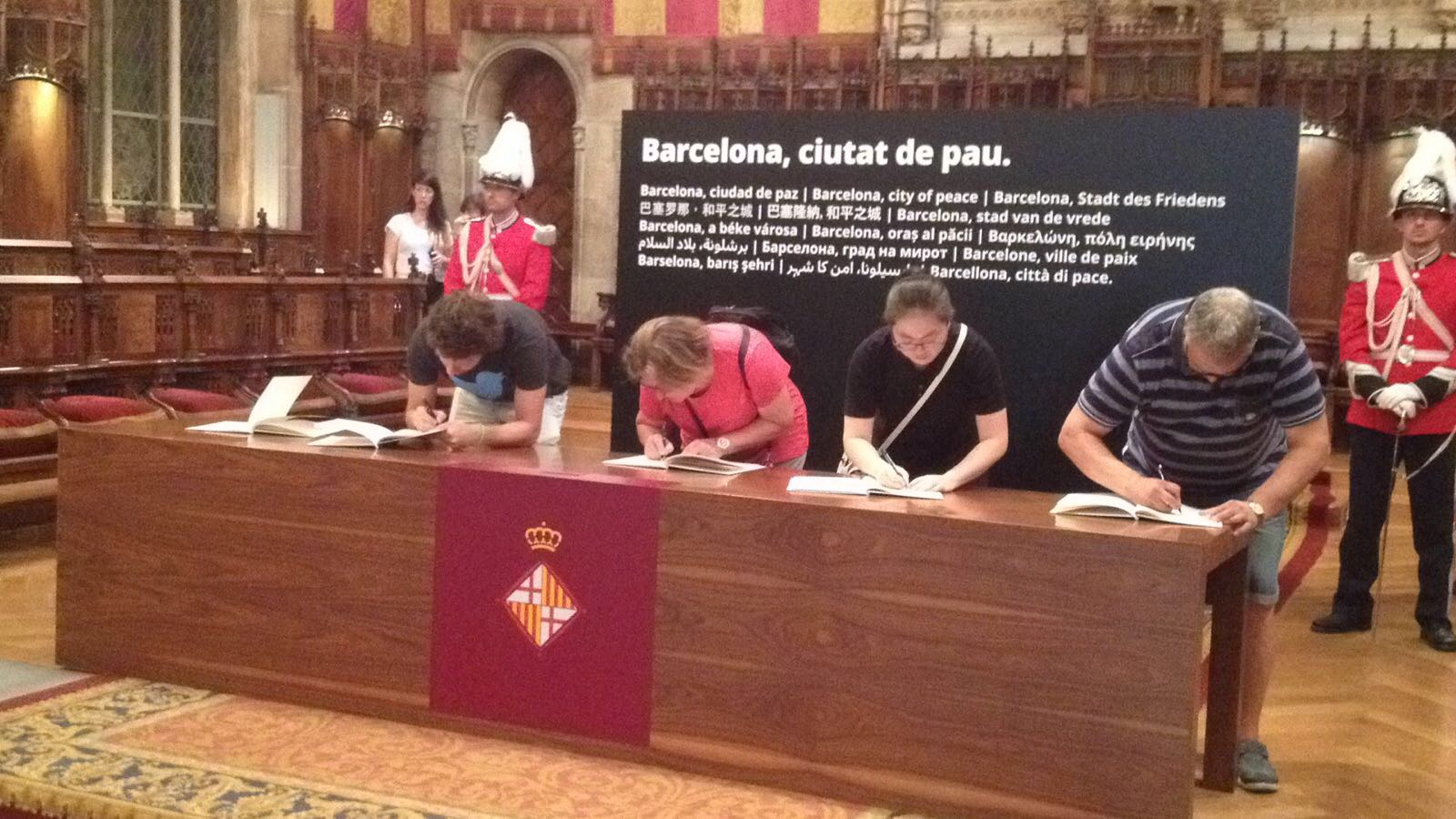 Ajuntament de Barcelona. Signatura de condol per l'atemptat de Barcelona. Agost-2017